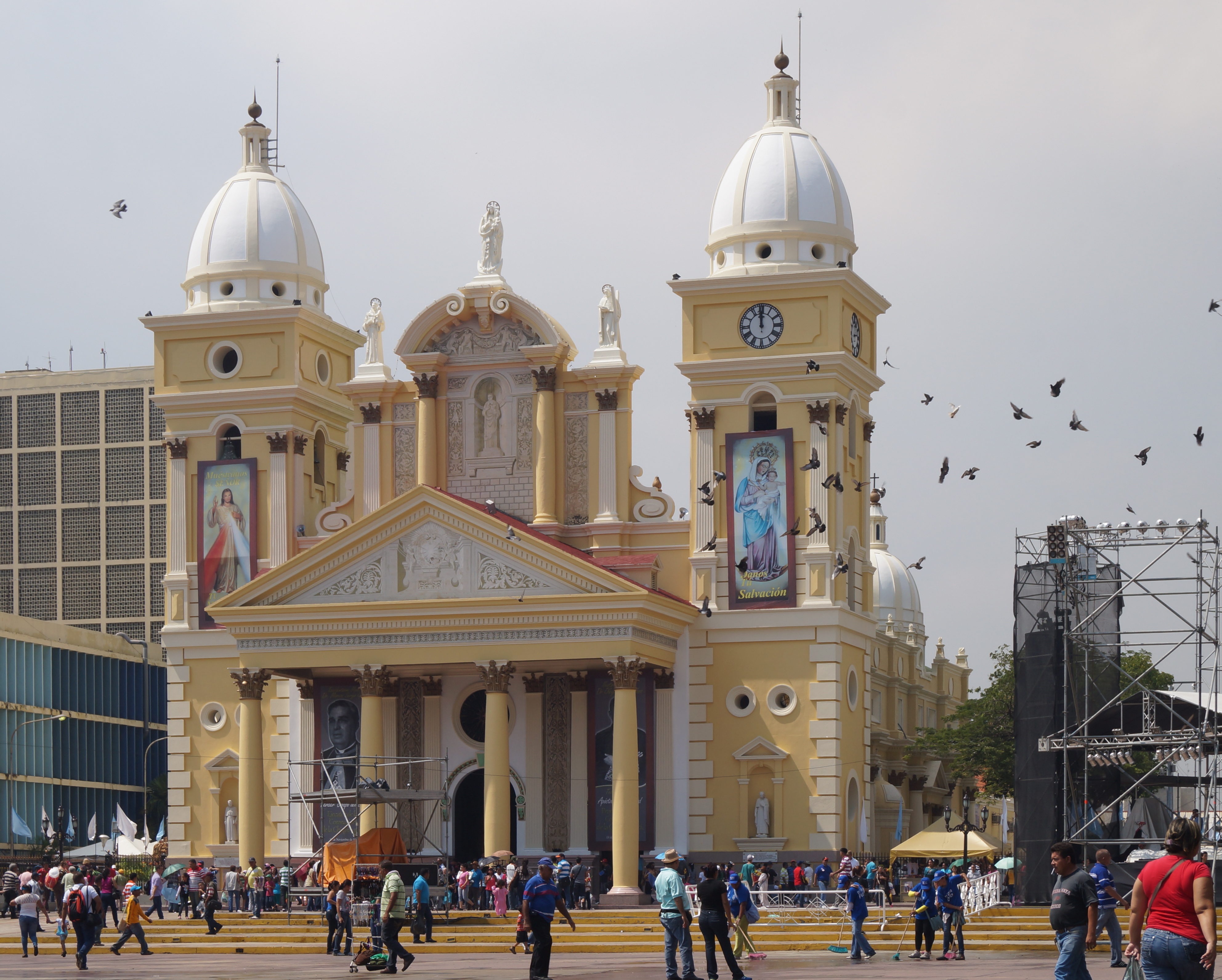 Basílica de Nuestra Señora de Chiquinquira